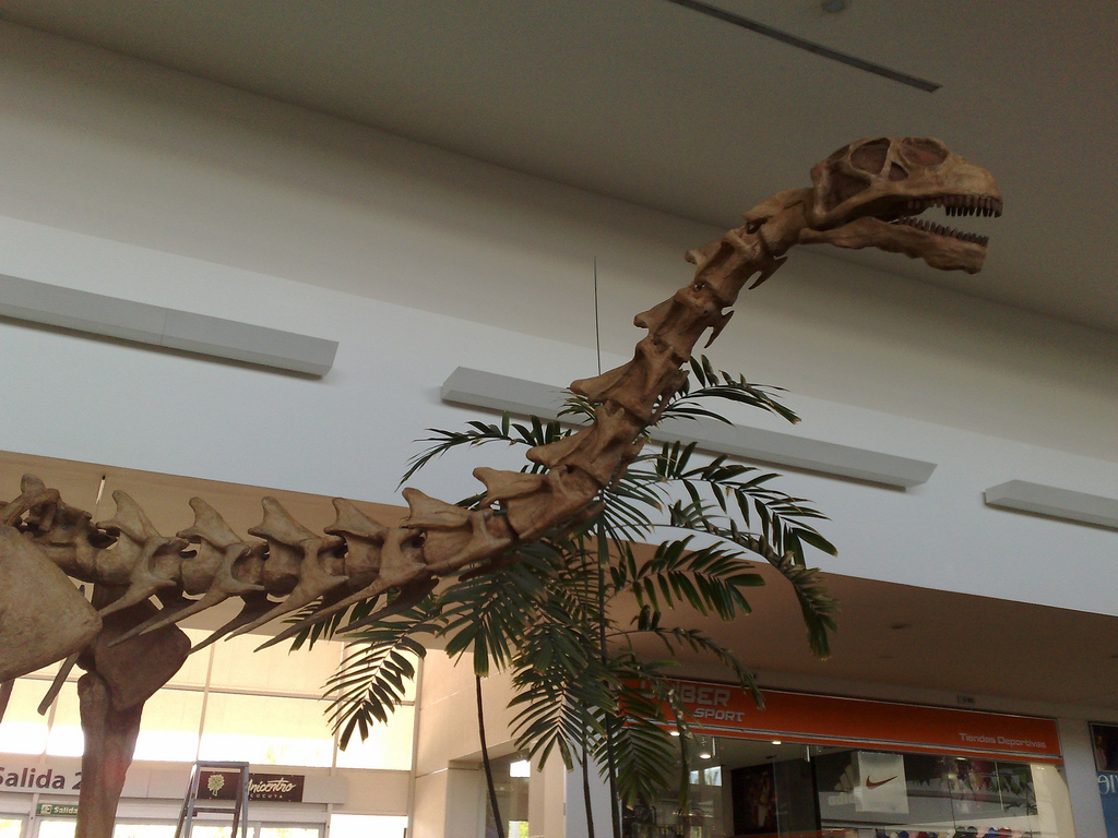 Epachtosaurus Sciuttoi